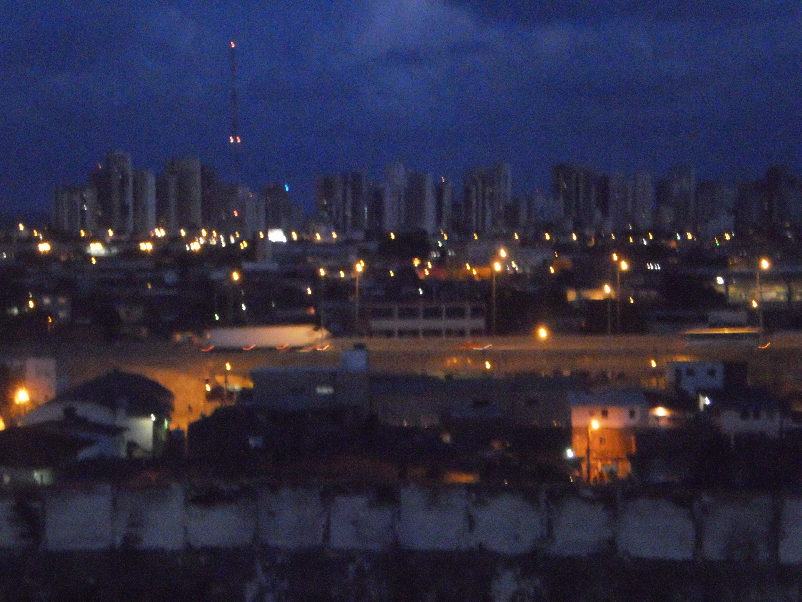 Bairros de Prazeres e Piedade vistos do Moro dos Guararapes a noite!